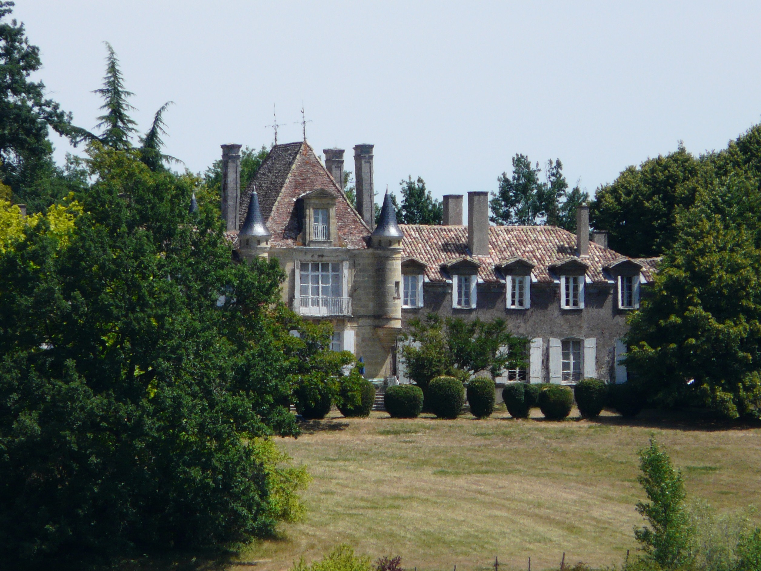 La façade sud du château de Pécany, Pomport, Dordogne, France.